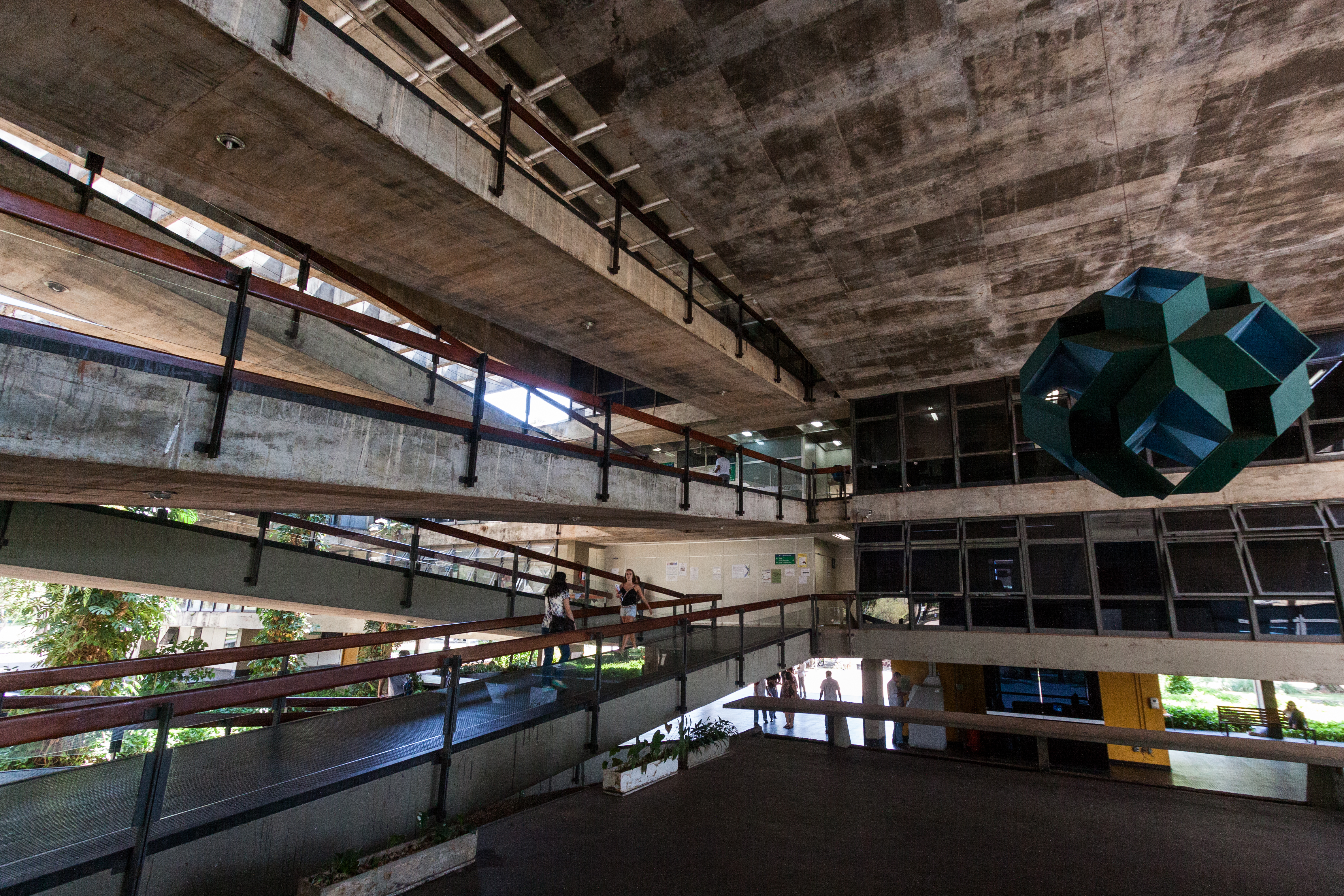 Foto:Edu Lauton/Secom UnB